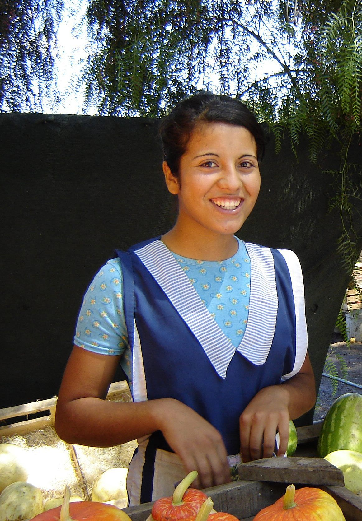 A seller of fruit jam in San Rafael, Mendoza, Argentina